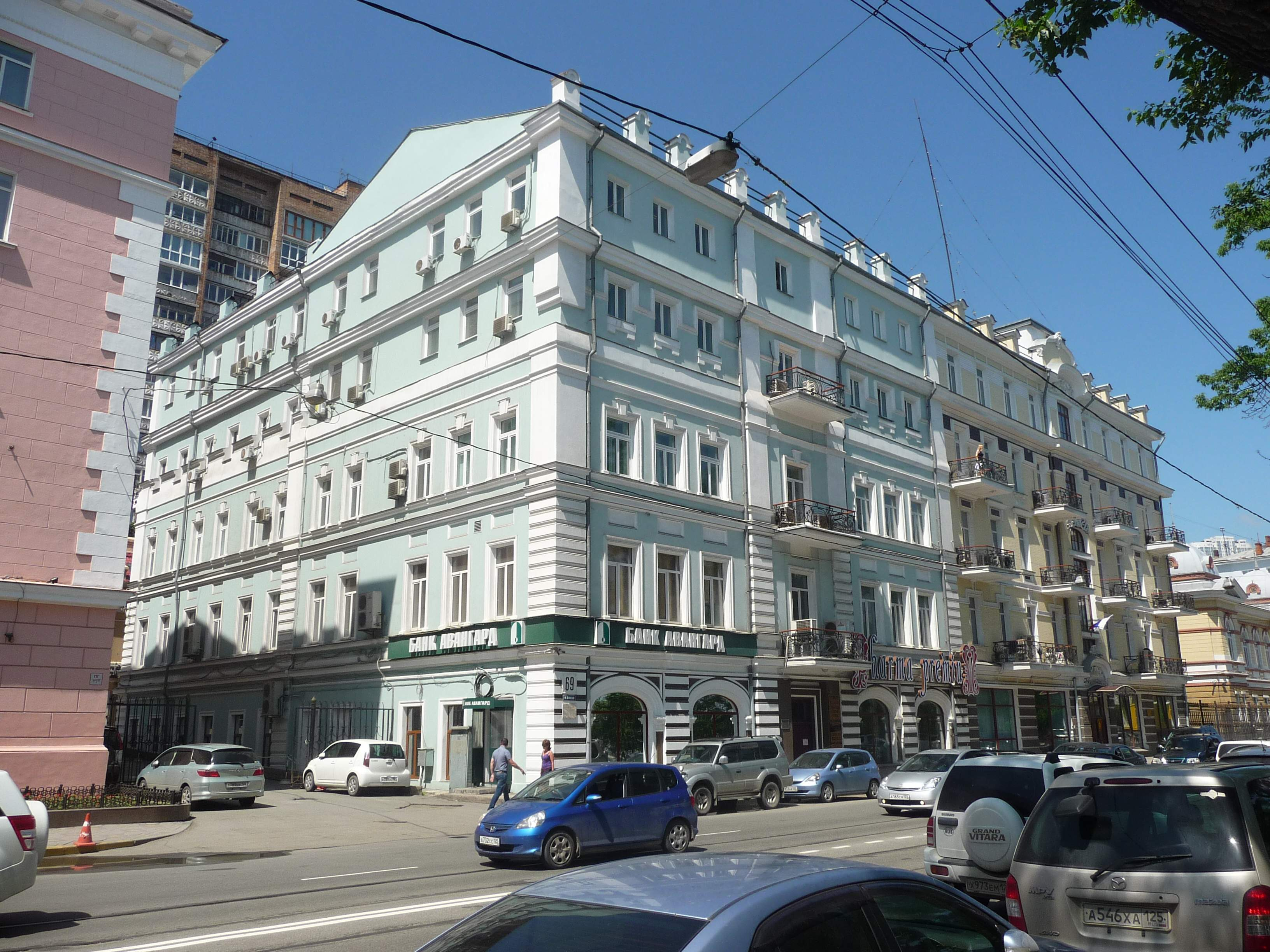 Владивосток, ул. Светланская, 69, 2012-07-05